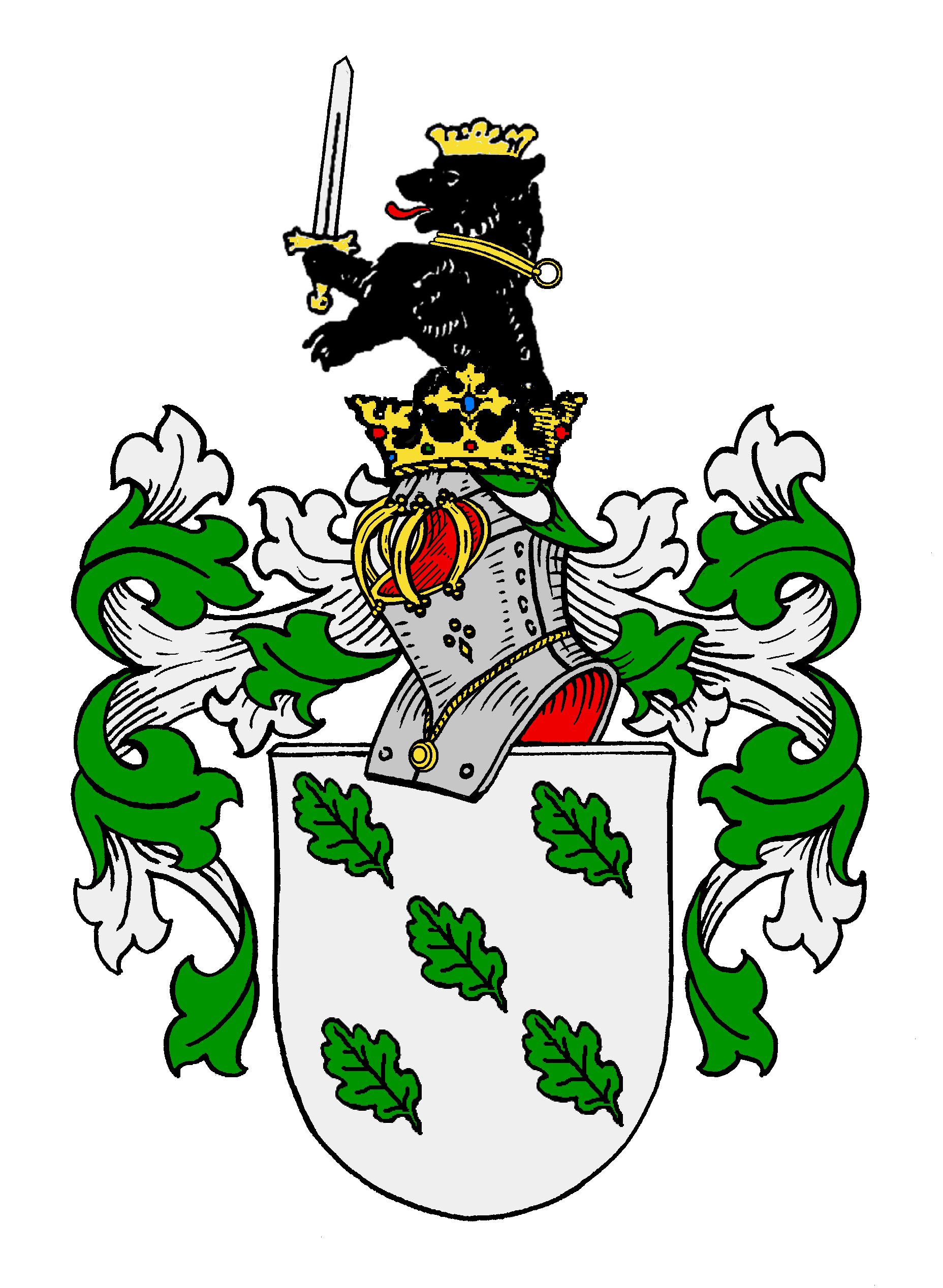 Wappen der von Olberg, einem von Förstern abstammenden, 1829 nobilitiertem Geschlecht aus dem Fürstentum Anhalt-Dessau.